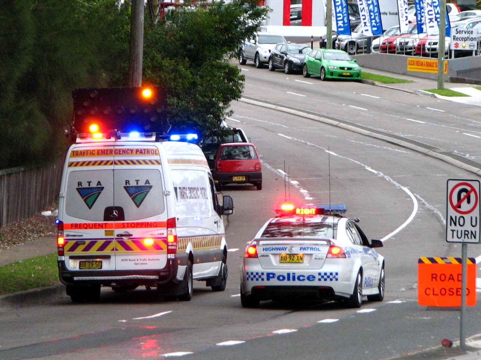 KU 221 & RTA Emergency Response Mercedes-Benz Sprinter.